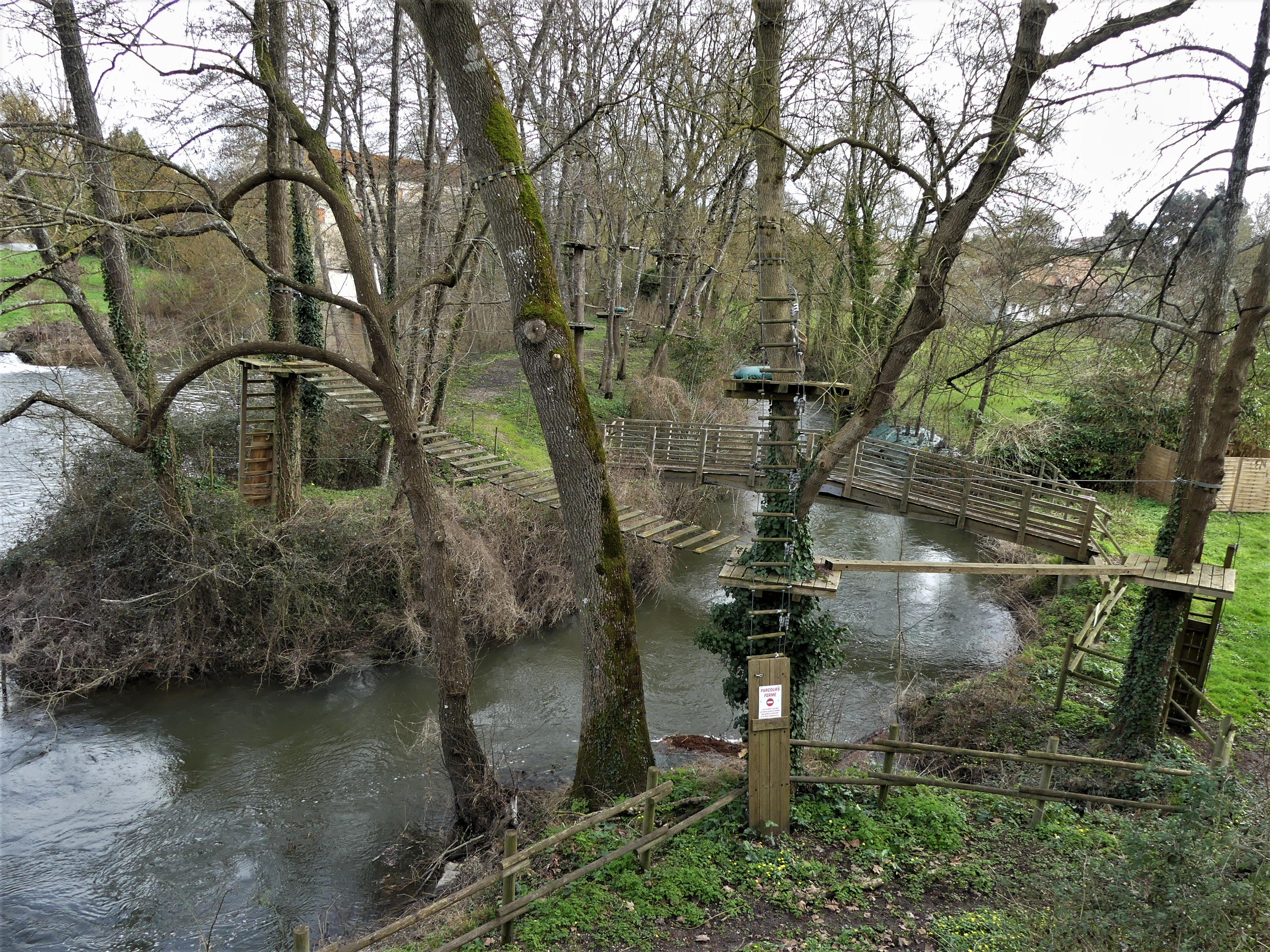 Parcours aventure à Saint-Aulaye, Saint Aulaye-Puymangou, Dordogne, France.